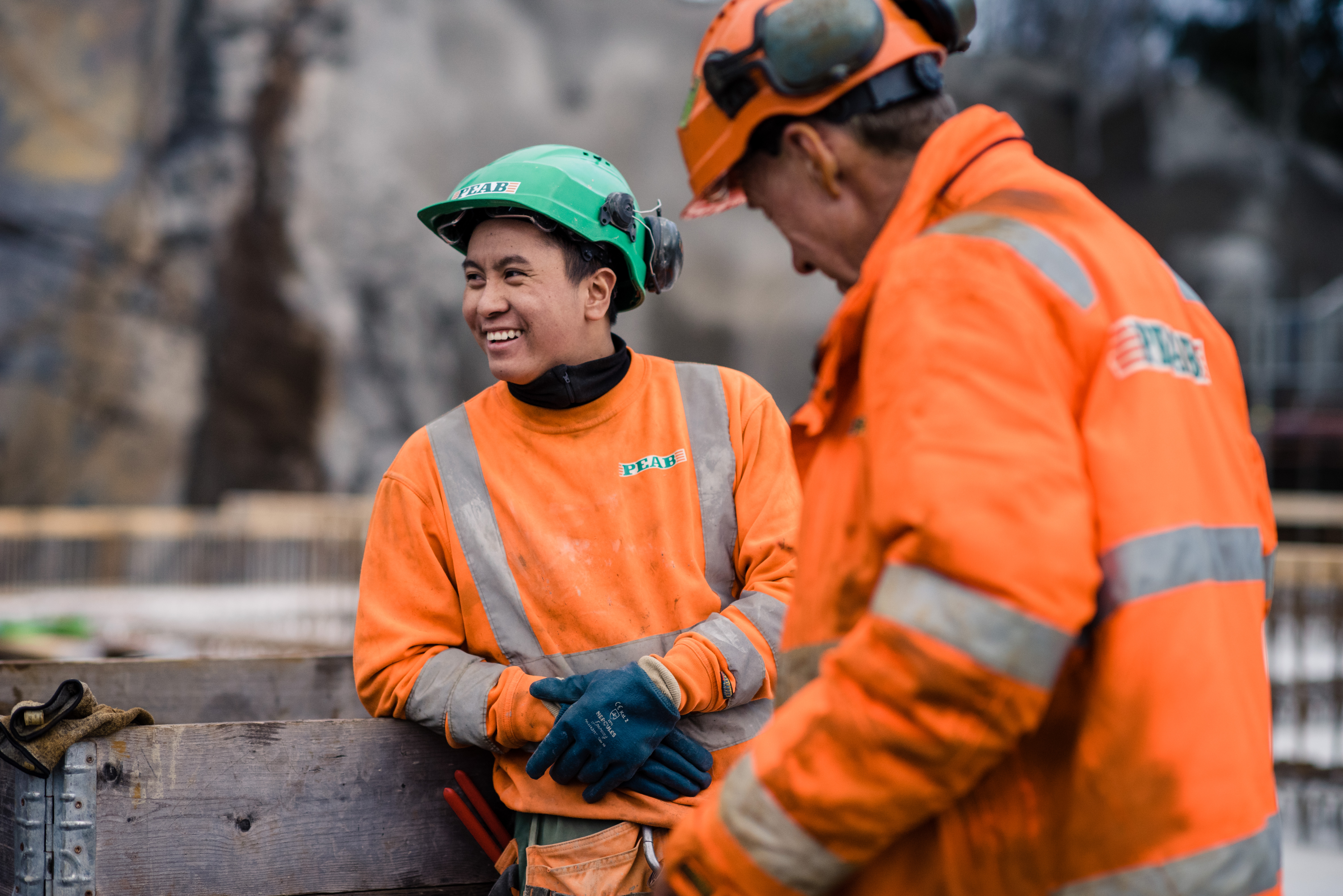 Peab er et bygg- og anleggsselskap